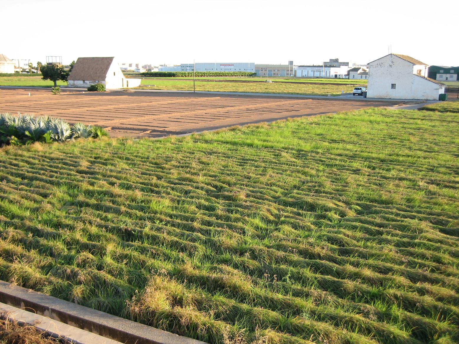 Campo de chufa en la huerta de Alboraya.